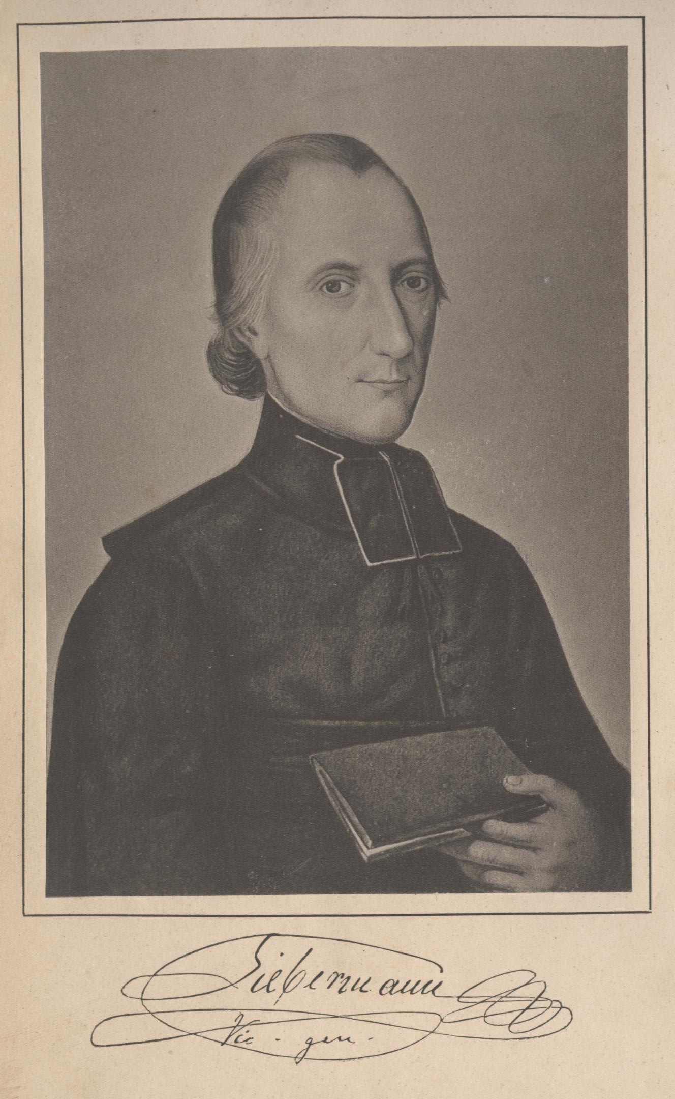 Litho